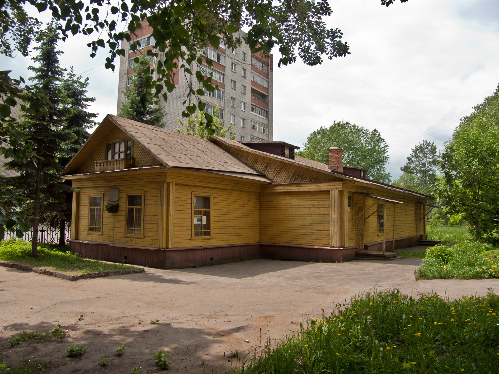 Мемориальный Дом-музей академика А.А. Ухтомского (г. Рыбинск Ярославской обл.)